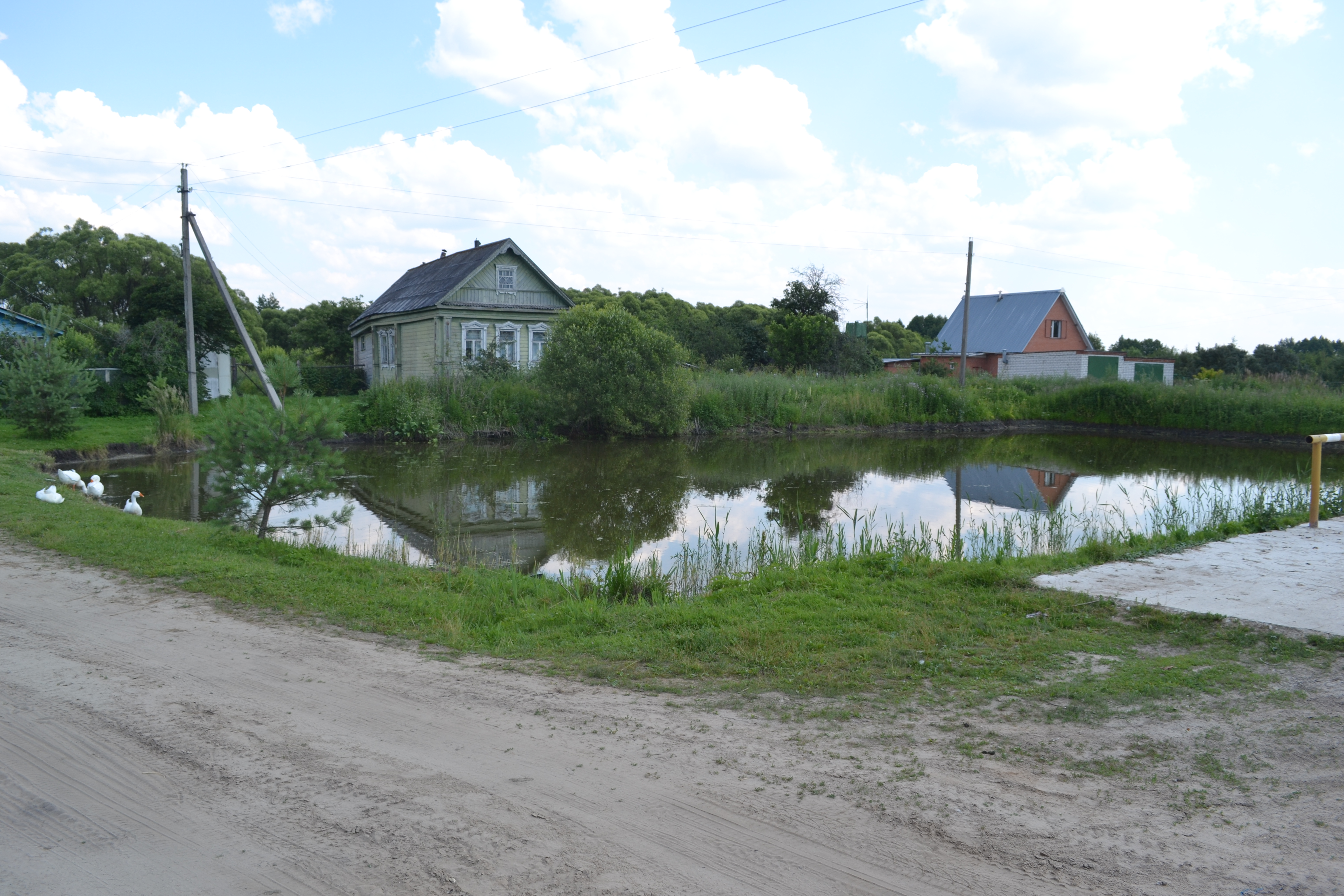 Пруд в деревне Коренец (Шатурский район)